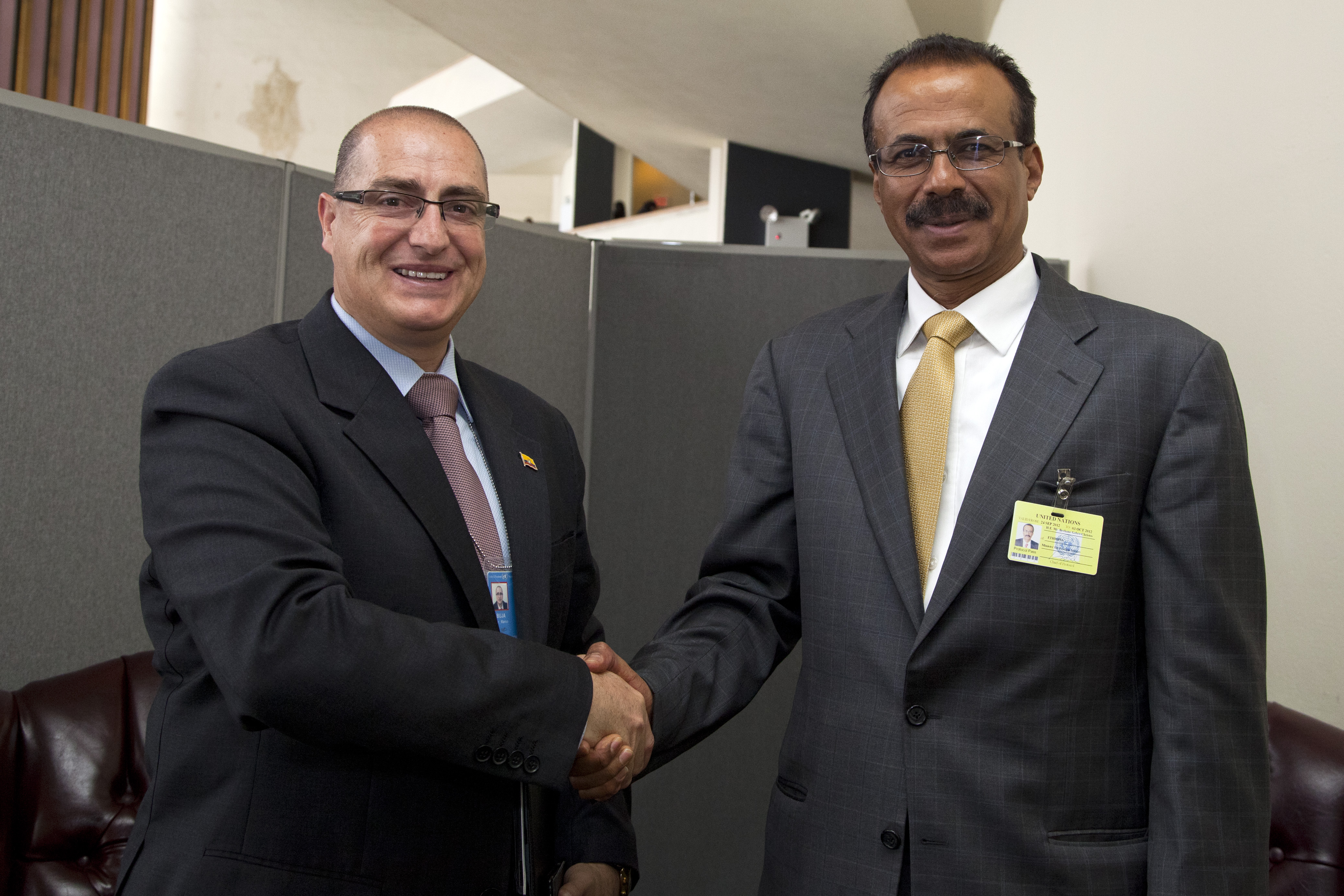 Nueva York (EEUU), 26 de septiembre 2012. El Vicecanciller Marco Albuja, mantuvo una reunión bilateral con el Ministro de Relaciones Exteriores de Etiopía, Berhane Gebre-Christos. Foto: Fernanda LeMarie - Ministerio de Relaciones Exteriores, Comercio e Integración.